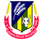 Bandeira